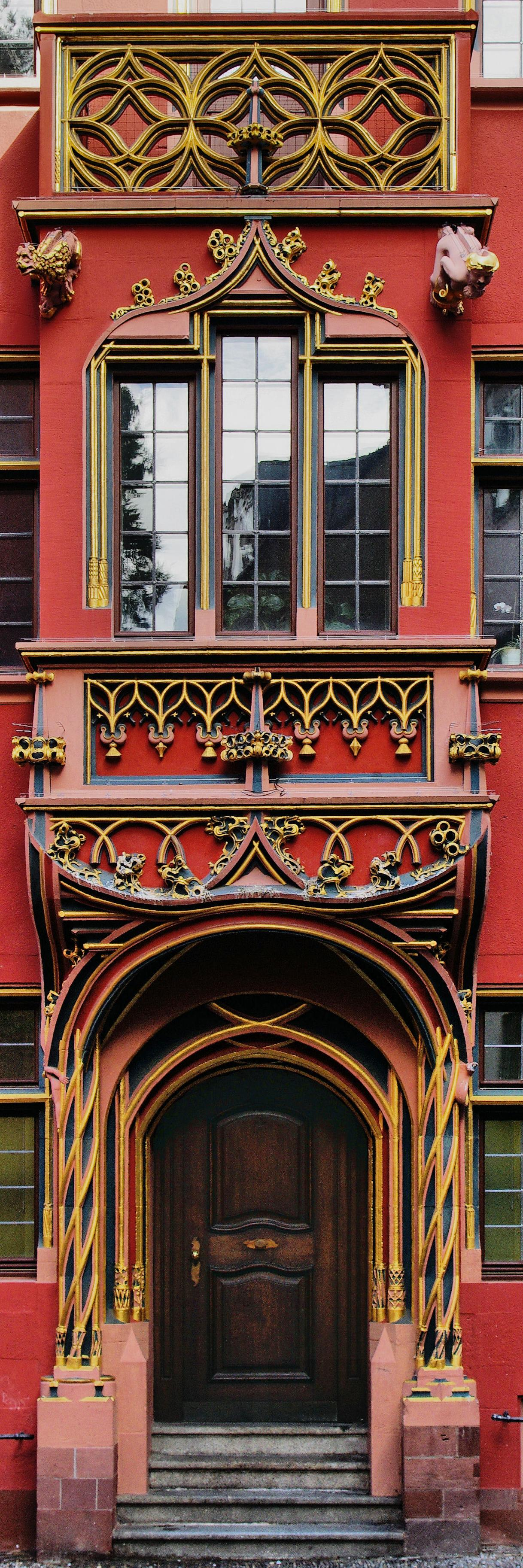 Historische Häuser in Freiburg